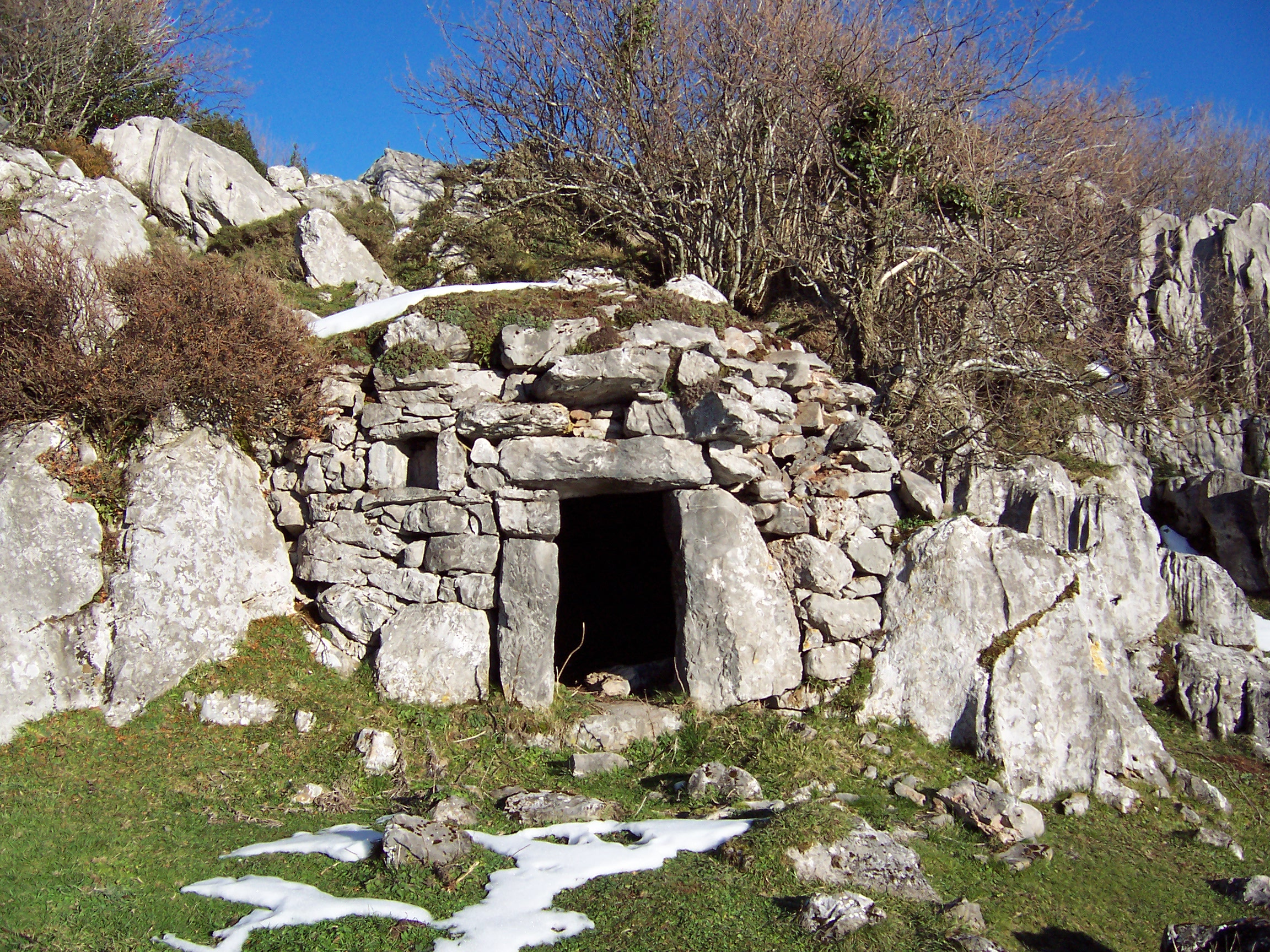 Desde el valle de Teverga, Pena Sobia en plena ruta de la Mesa This is a photography of a Special Area of Conservation in Spain with the ID: ES1200011. Natura2000 entry, EEA entry